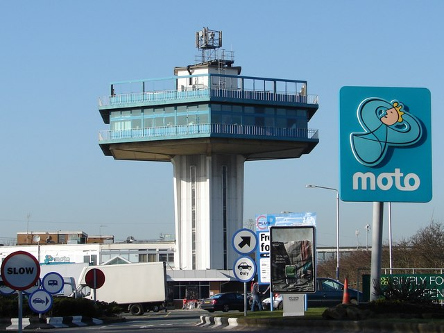 Hello Moto